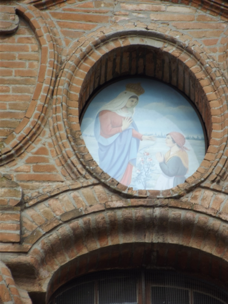 Chiesa Via Gioia